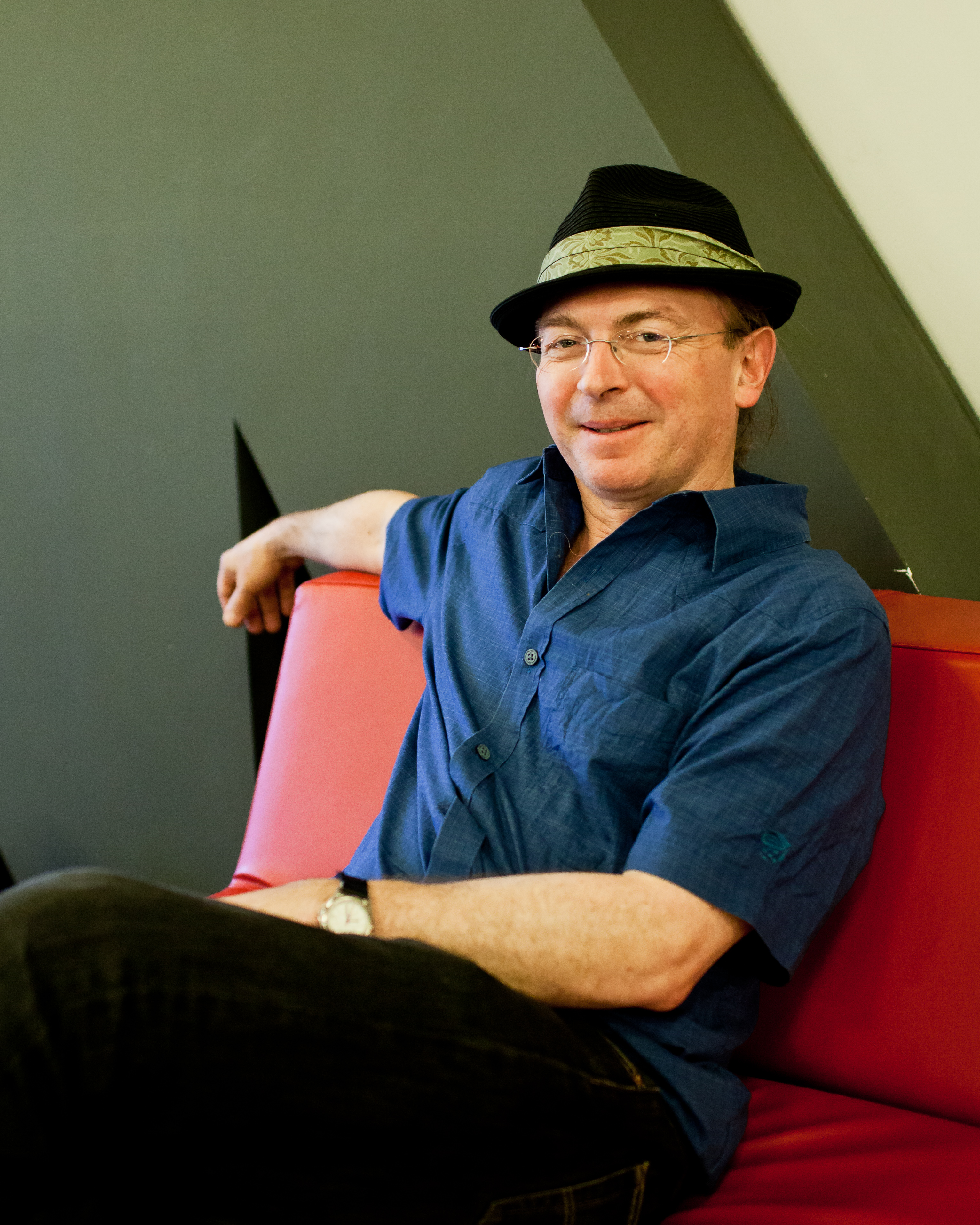 Сет Ллойд на презентации книги "Программируя Вселенную" (Москва, книжный магазин "Москва" на Воздвиженке)